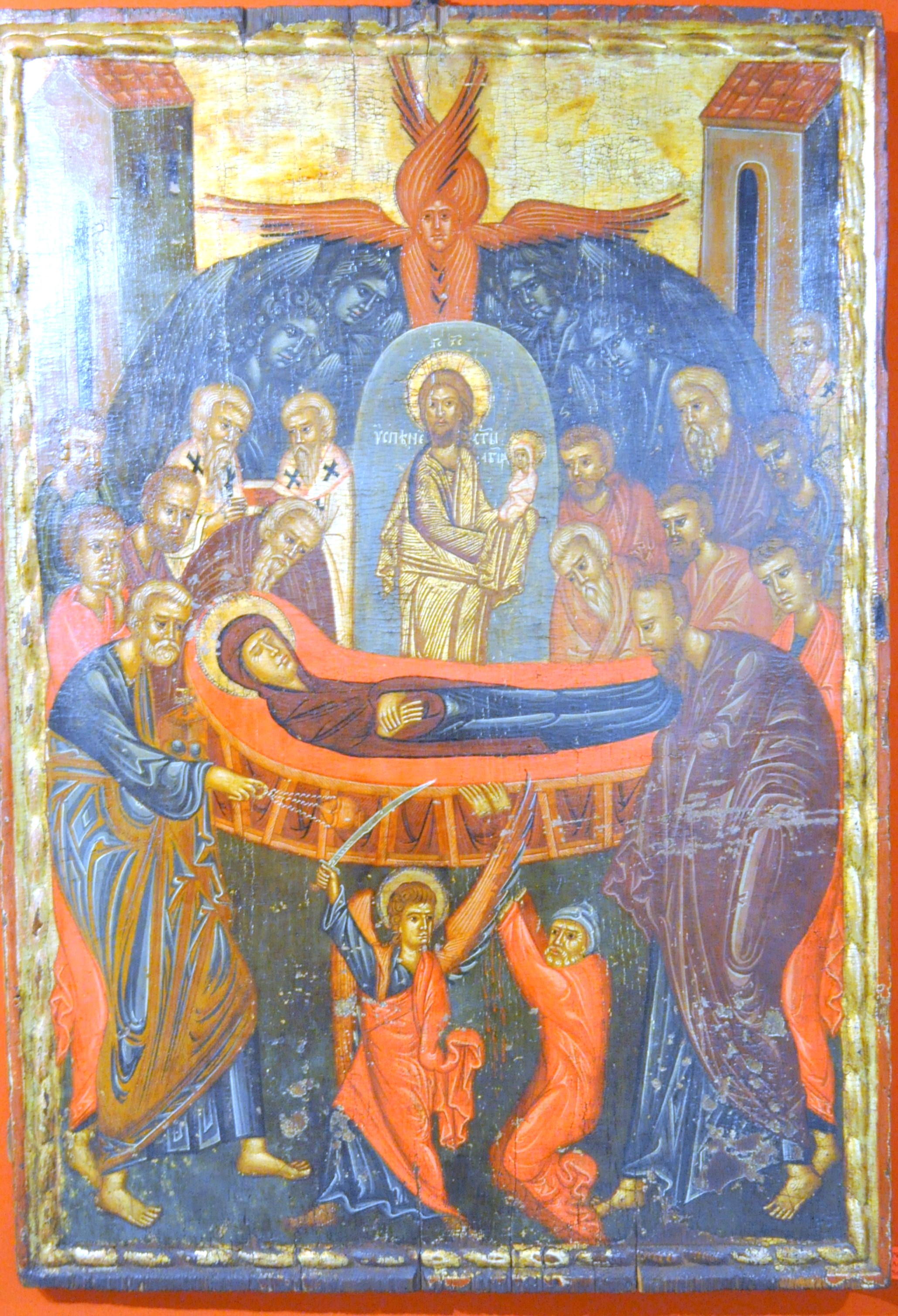 Icoană care a aparținut bisericii de lemn din Nadășu, județul Cluj